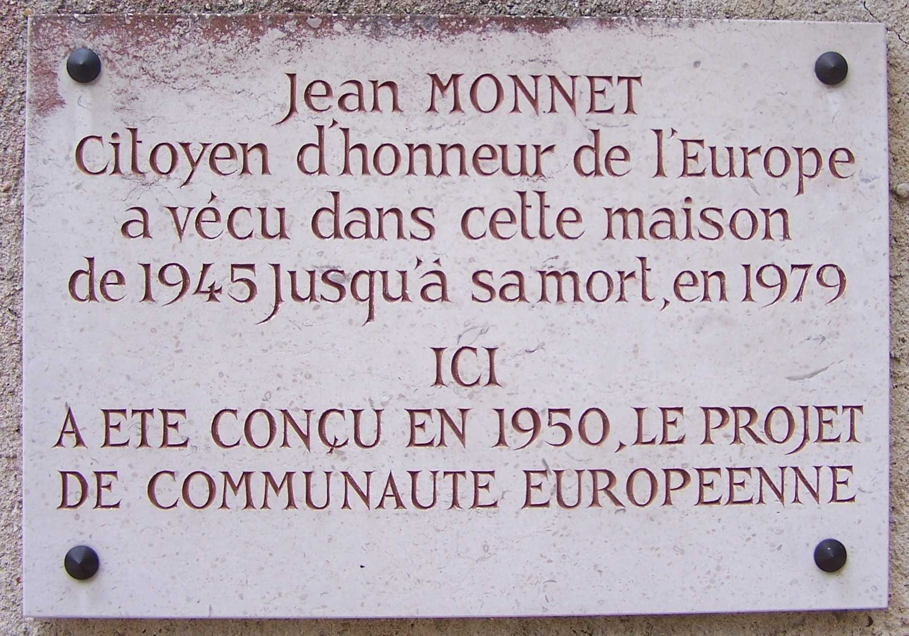 Plaque commémorative de Jean Monnet à Bazoches-sur-Guyonne (Yvelines, France)